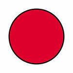 Қазақша (кирил): Дөңгелек